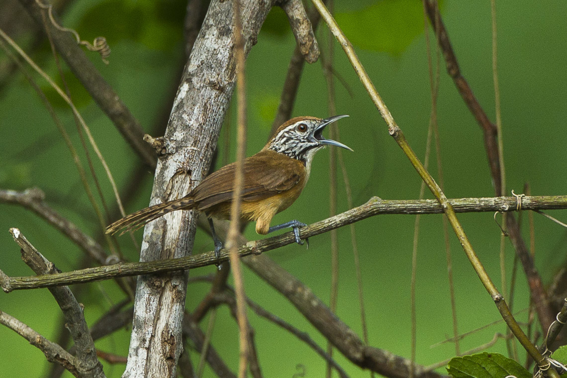 Happy Wren - Oaxaca - Mexico_S4E8421